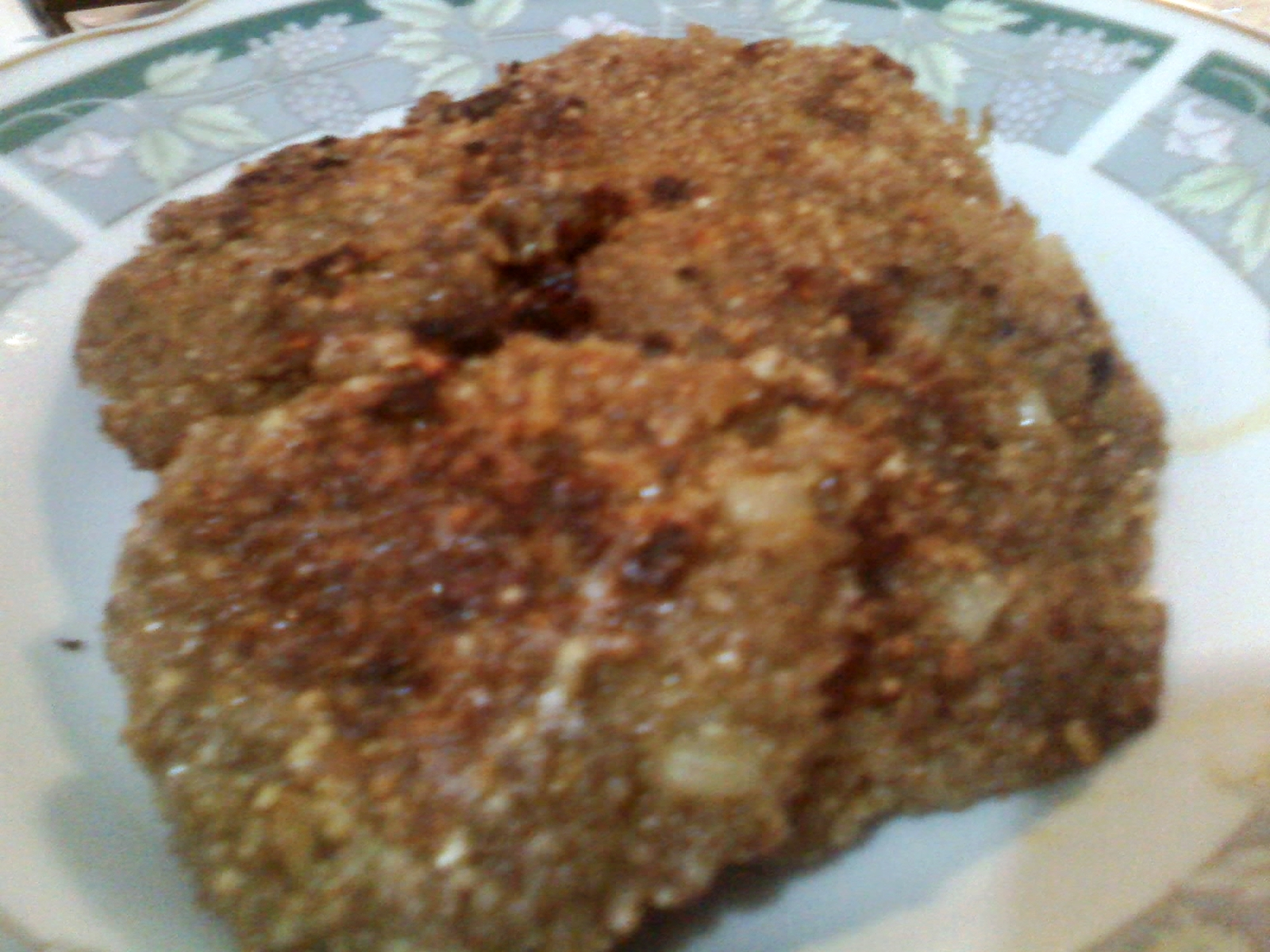 Bir köfte çeşidi, Besmeç.